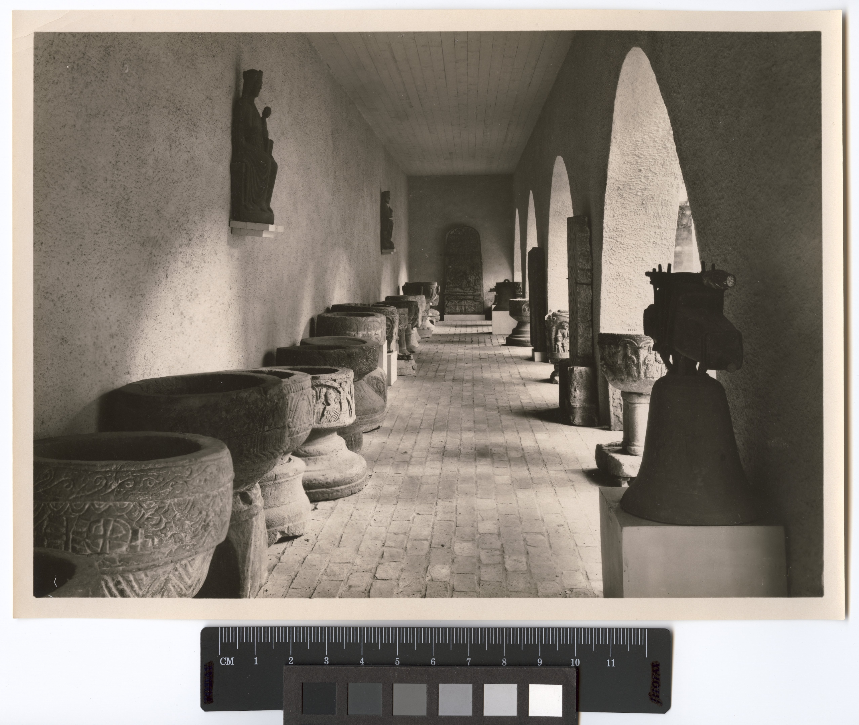 Utställning av dopfuntar, Göteborgsutställningen 1923